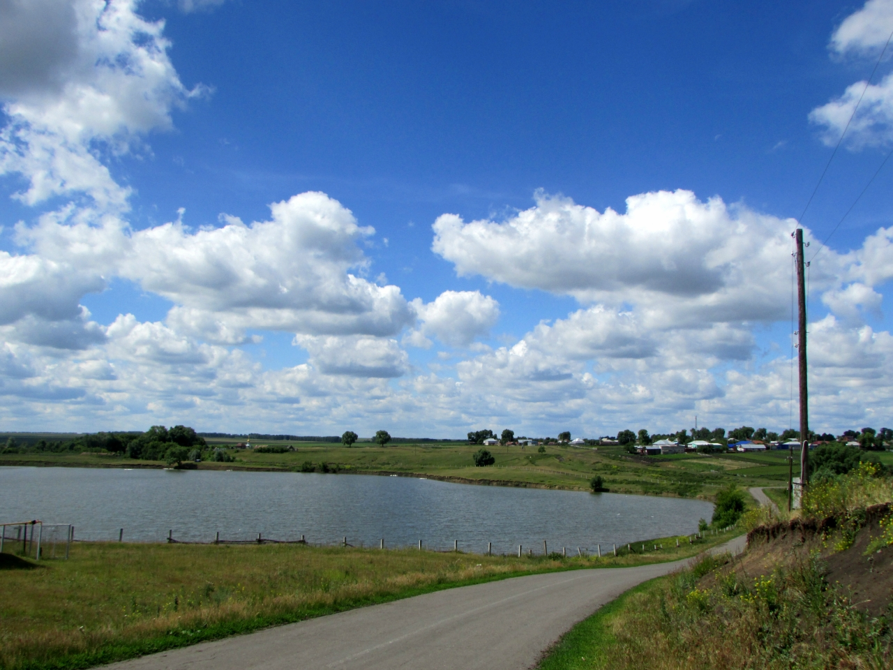 Белое озеро. Расположено у деревень Белое Озеро и Полевые Буртасы, имеет карстовое происхождение, по объёму занимает второе место в республике и является памятником природы регионального значения.